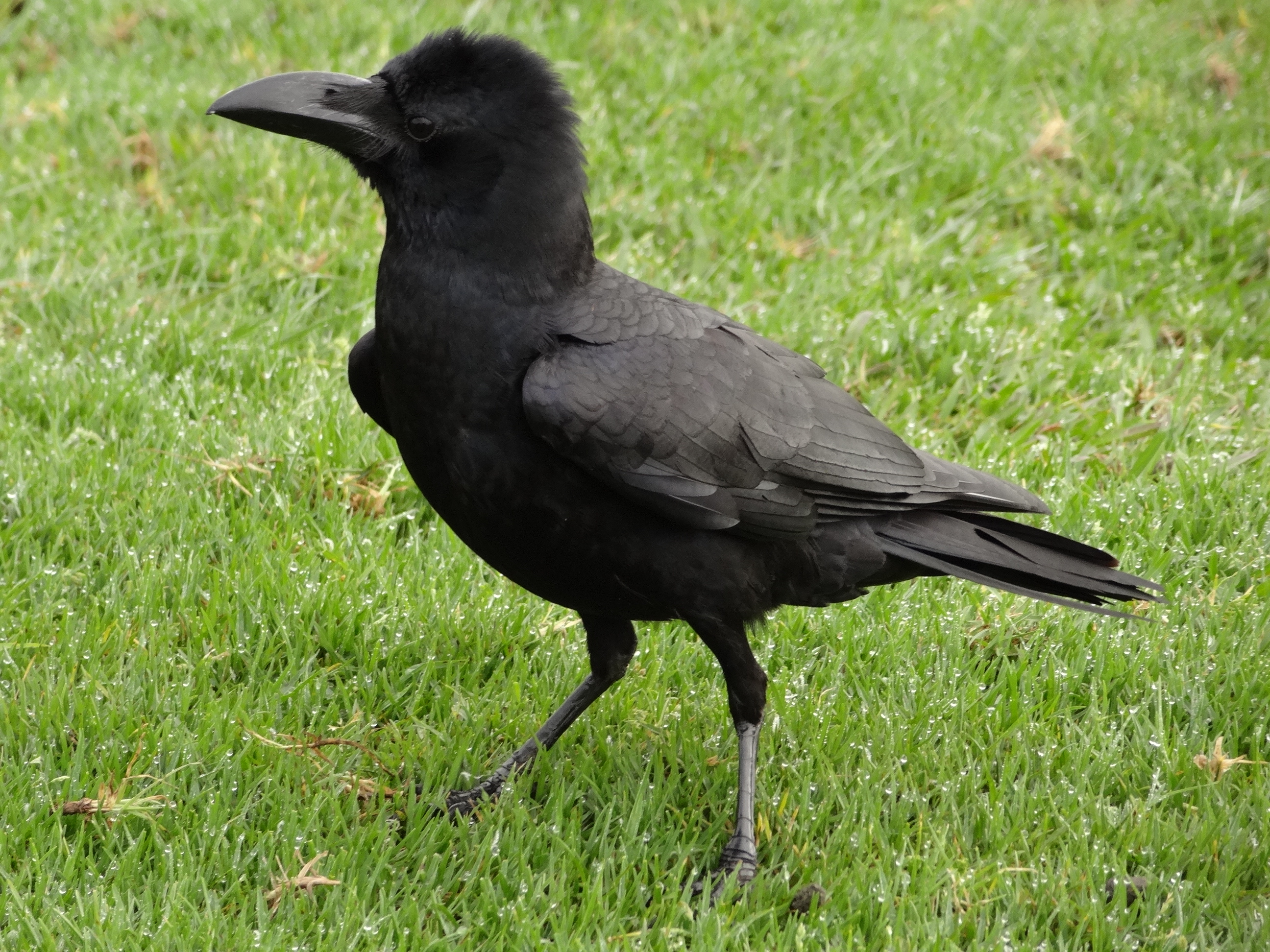 Corvus in Horton Plains National Park